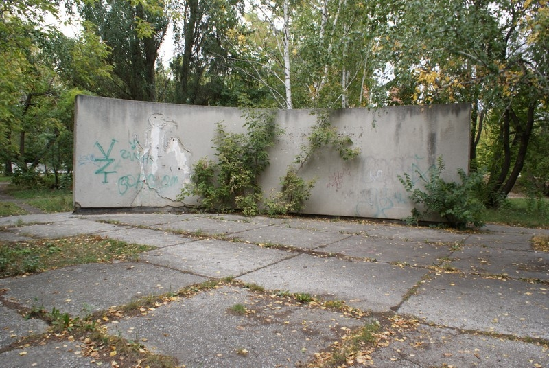 Kurgan.Pro